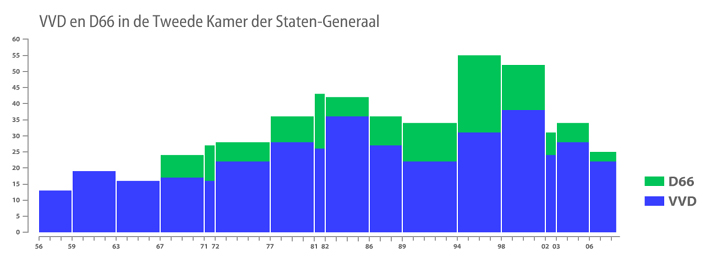 Historisch overzicht van de zetelaantallen van de liberale partijen VVD en D66 in de Tweede Kamer der Staten-Generaal. Eigen werk.